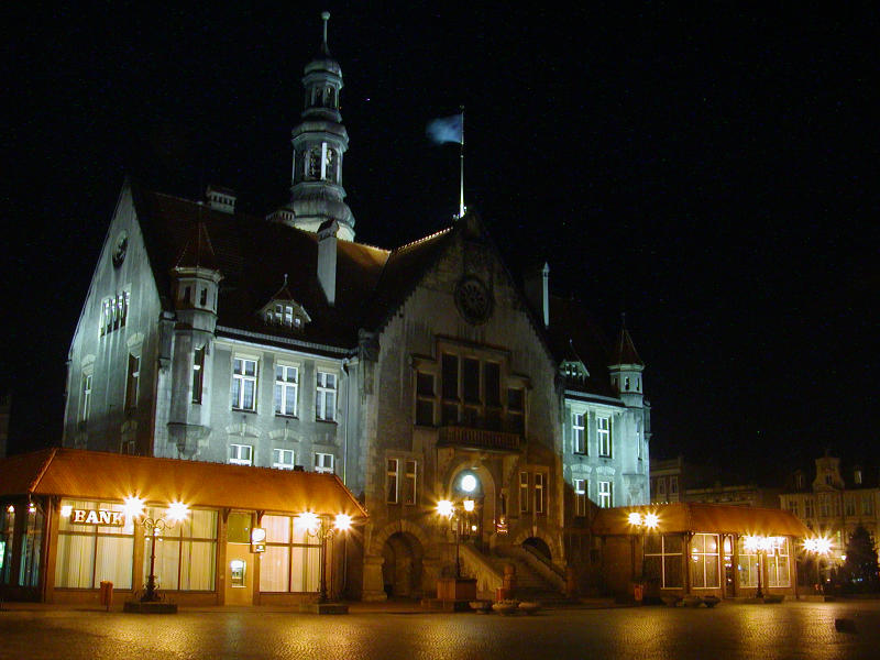 Zdjęcie Krotoszyna nocą - ratusz